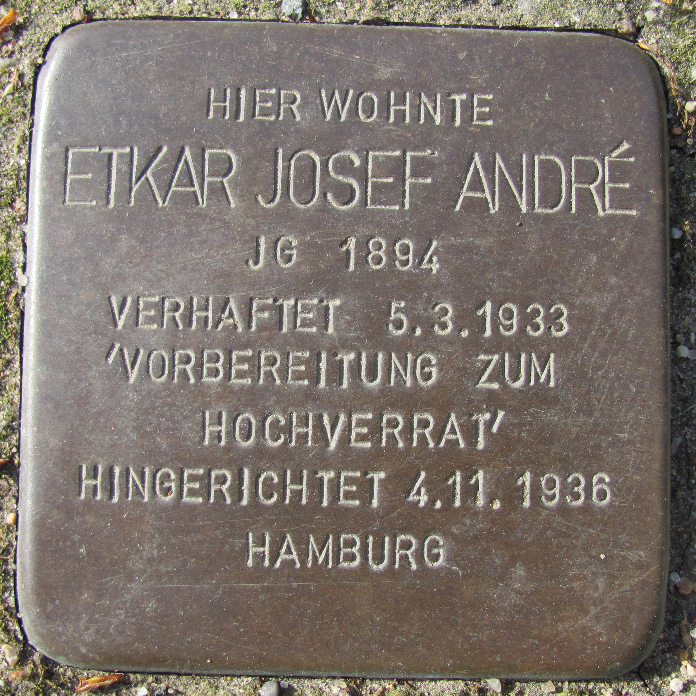 Stolperstein für Etkar Josef André (Lebenslauf bei vor dem Haus Adlerstraße 12